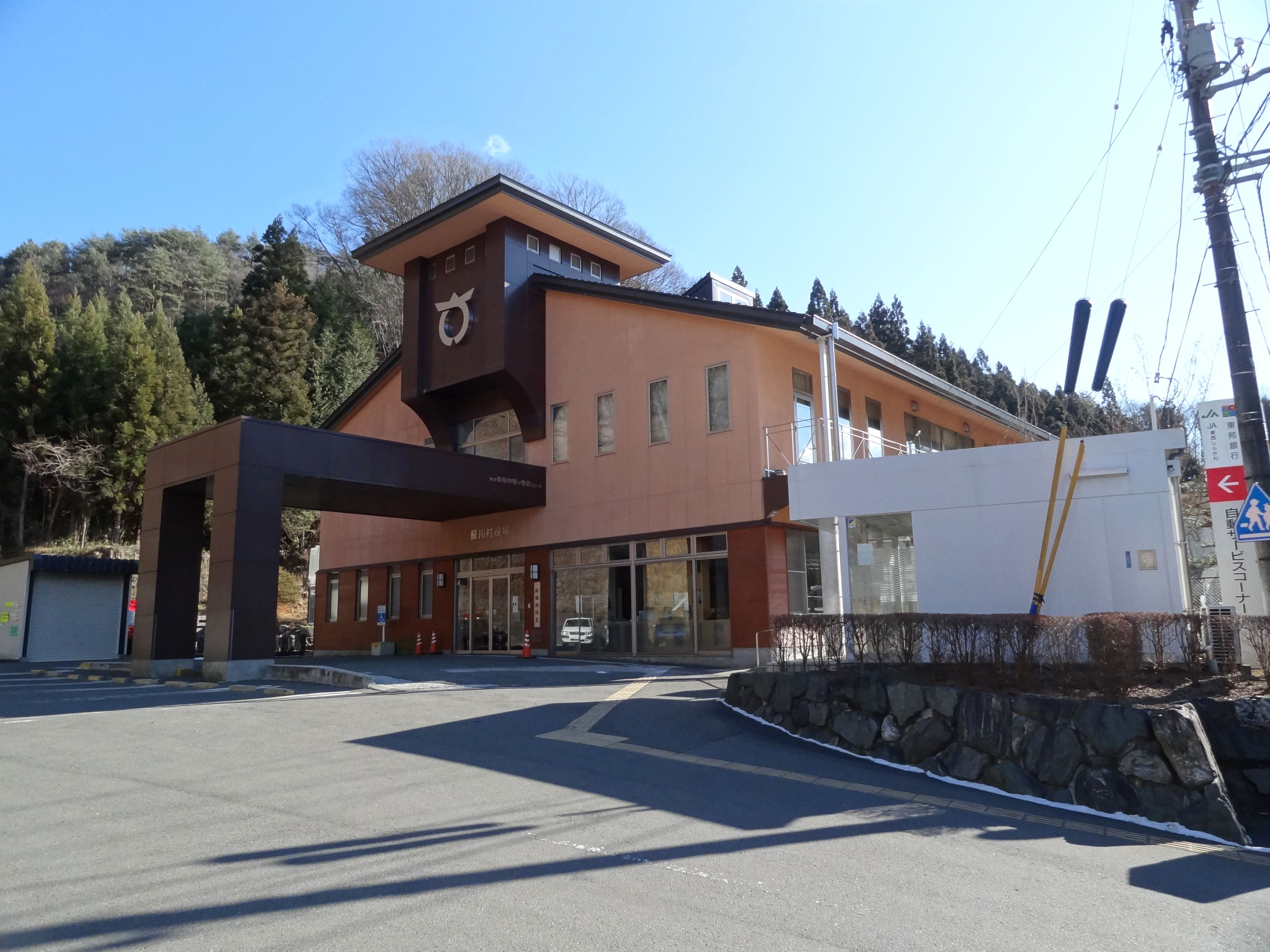 鮫川村役場